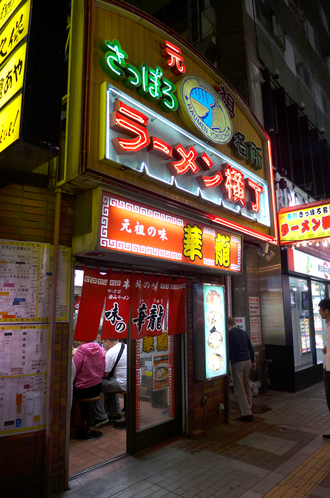 Sapporo Raumen Yokocho